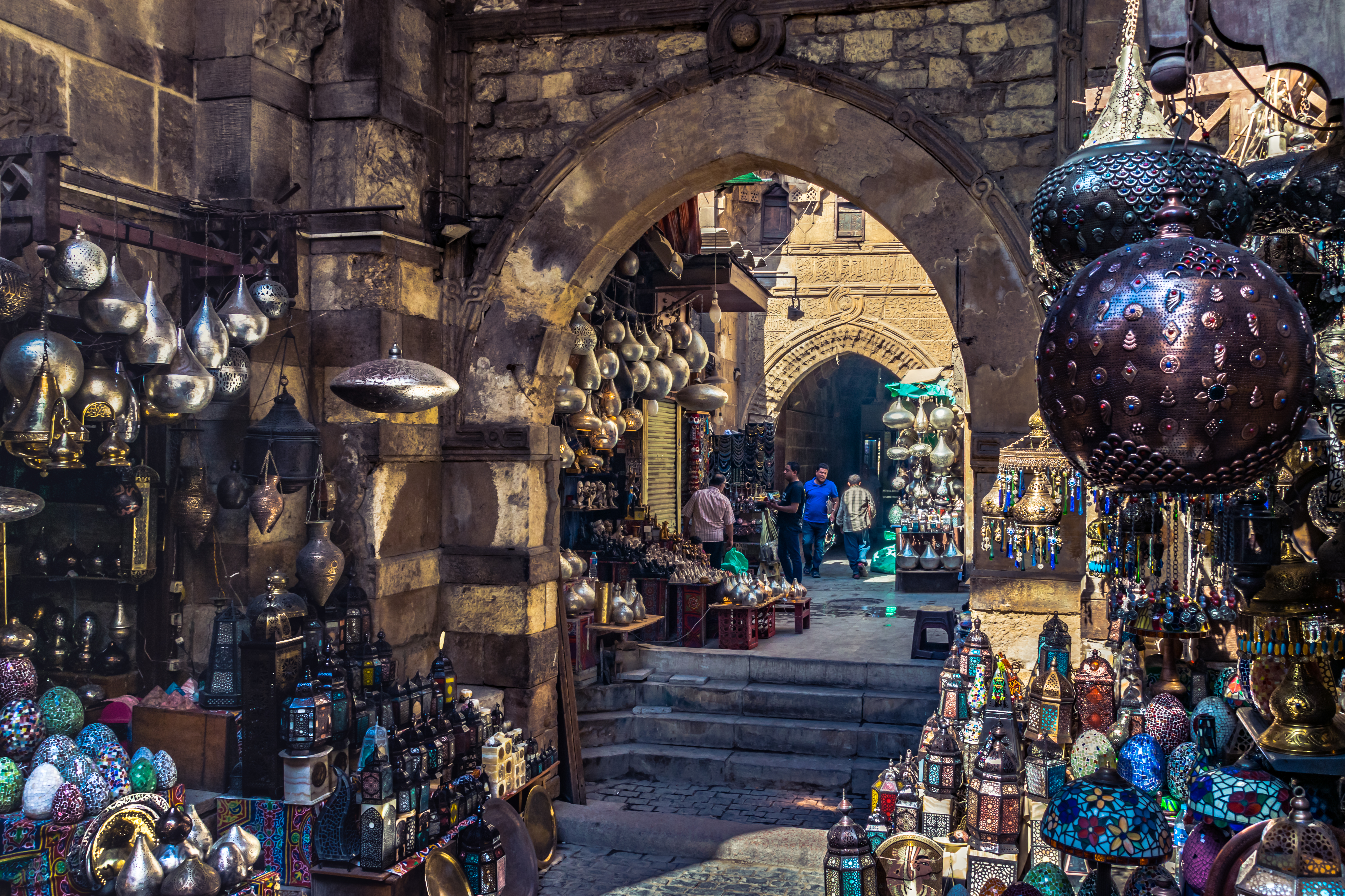 خان الخليلي بحى الحسين